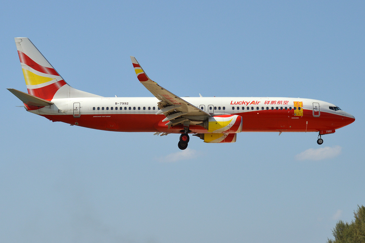 Lucky Air, B-7992, Boeing 737-8AL